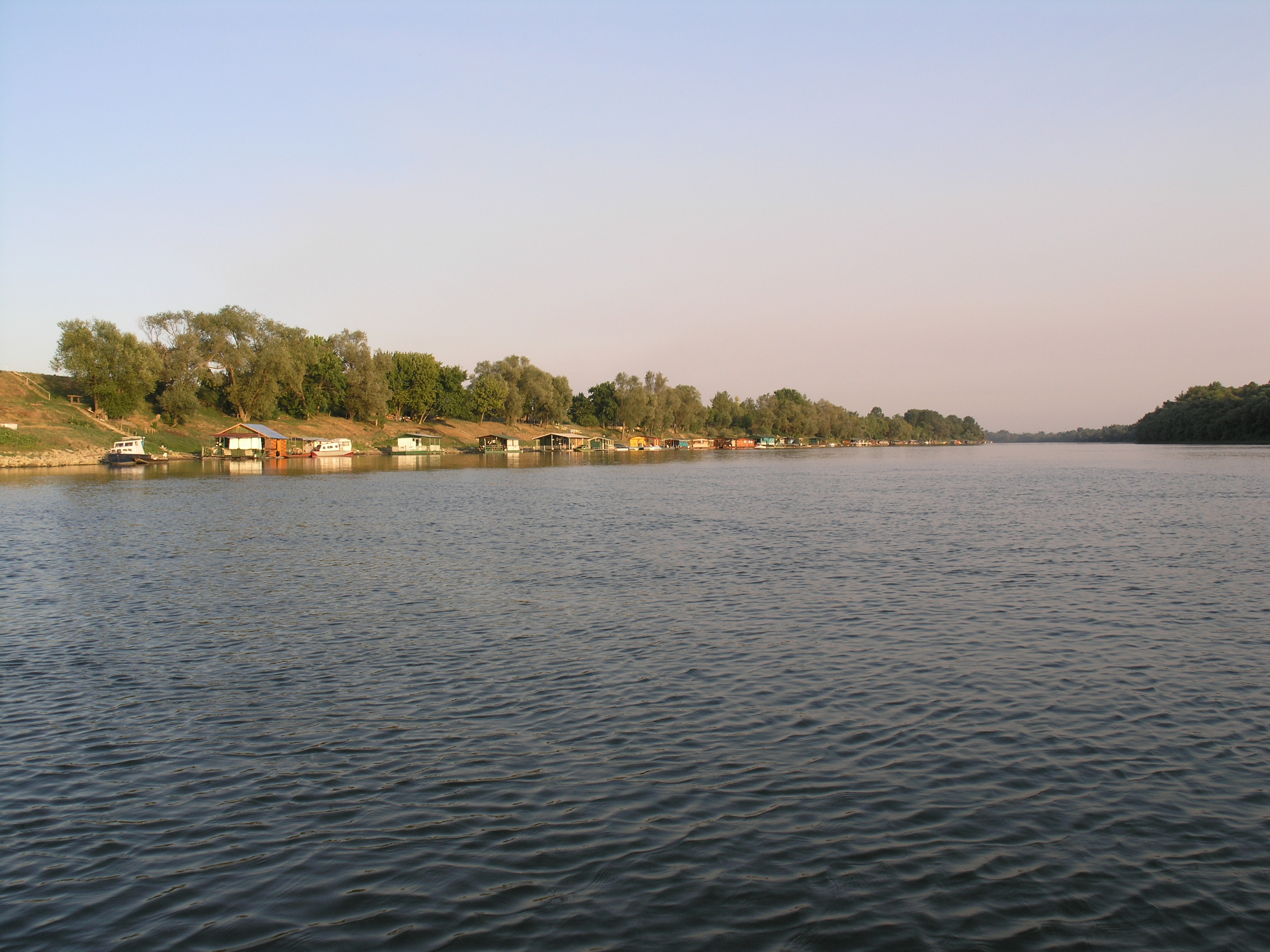 Slavonski Brod, rijeka Sava (splavovi)